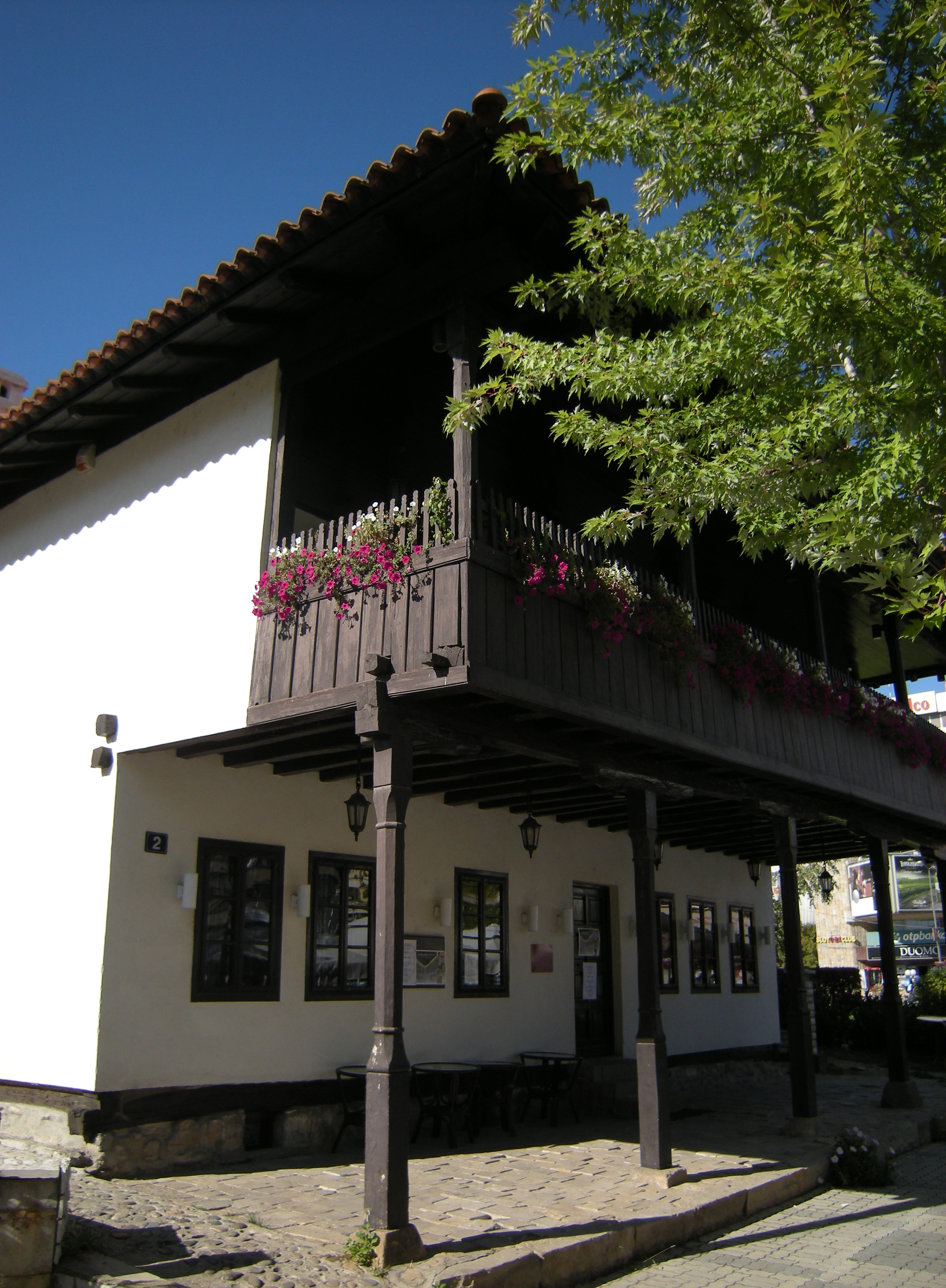 Кућа Симића спада у најстарије грађевине у Крушевцу. Изузев архитектонских вредности, значајна је и за културну историју града.